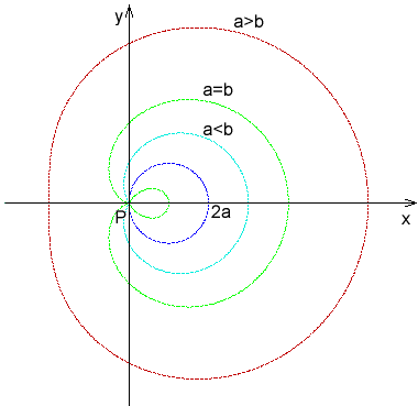 Pascalova závitnice.